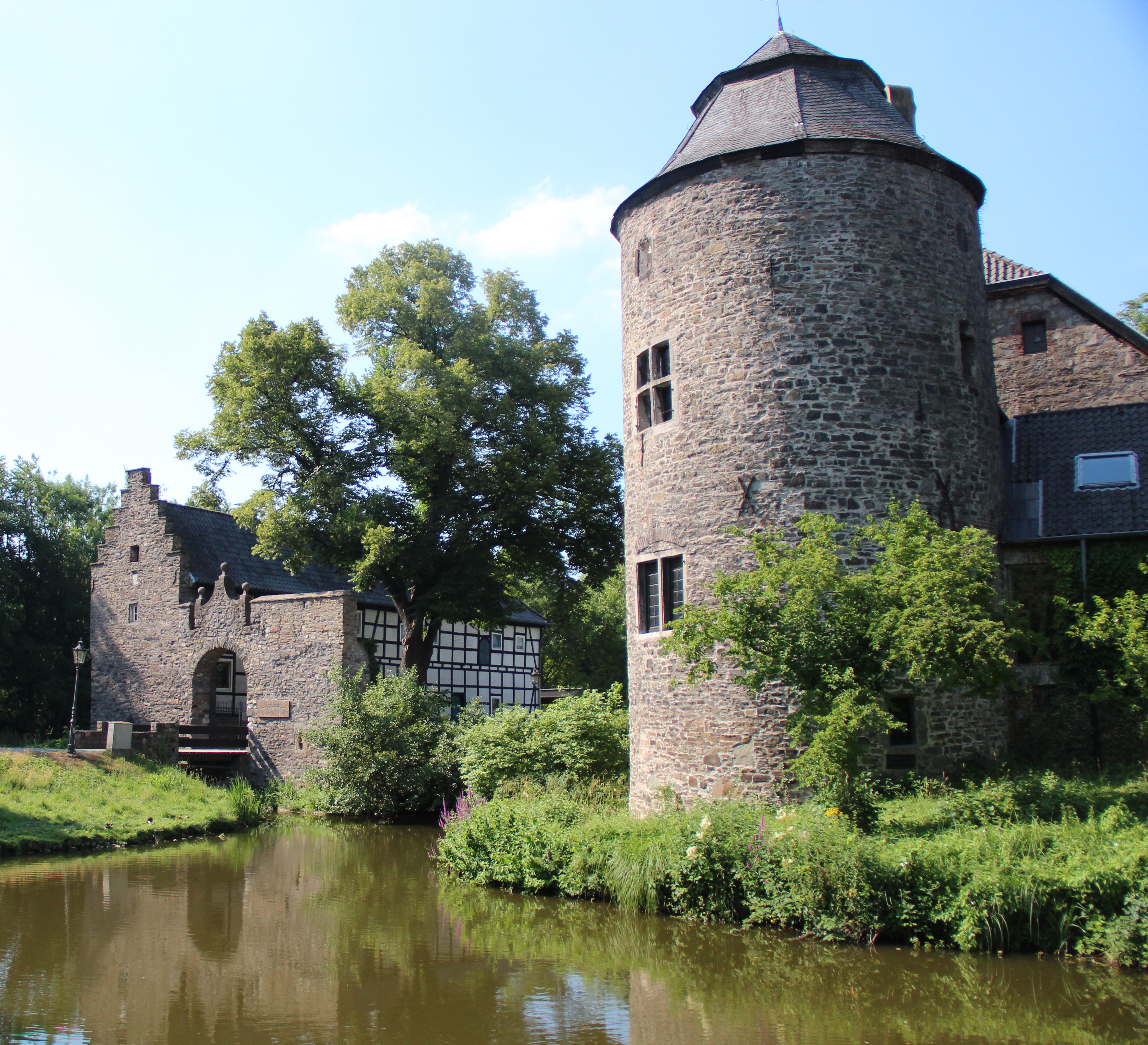 De waterburcht "Haus zum Haus" in Ratingen